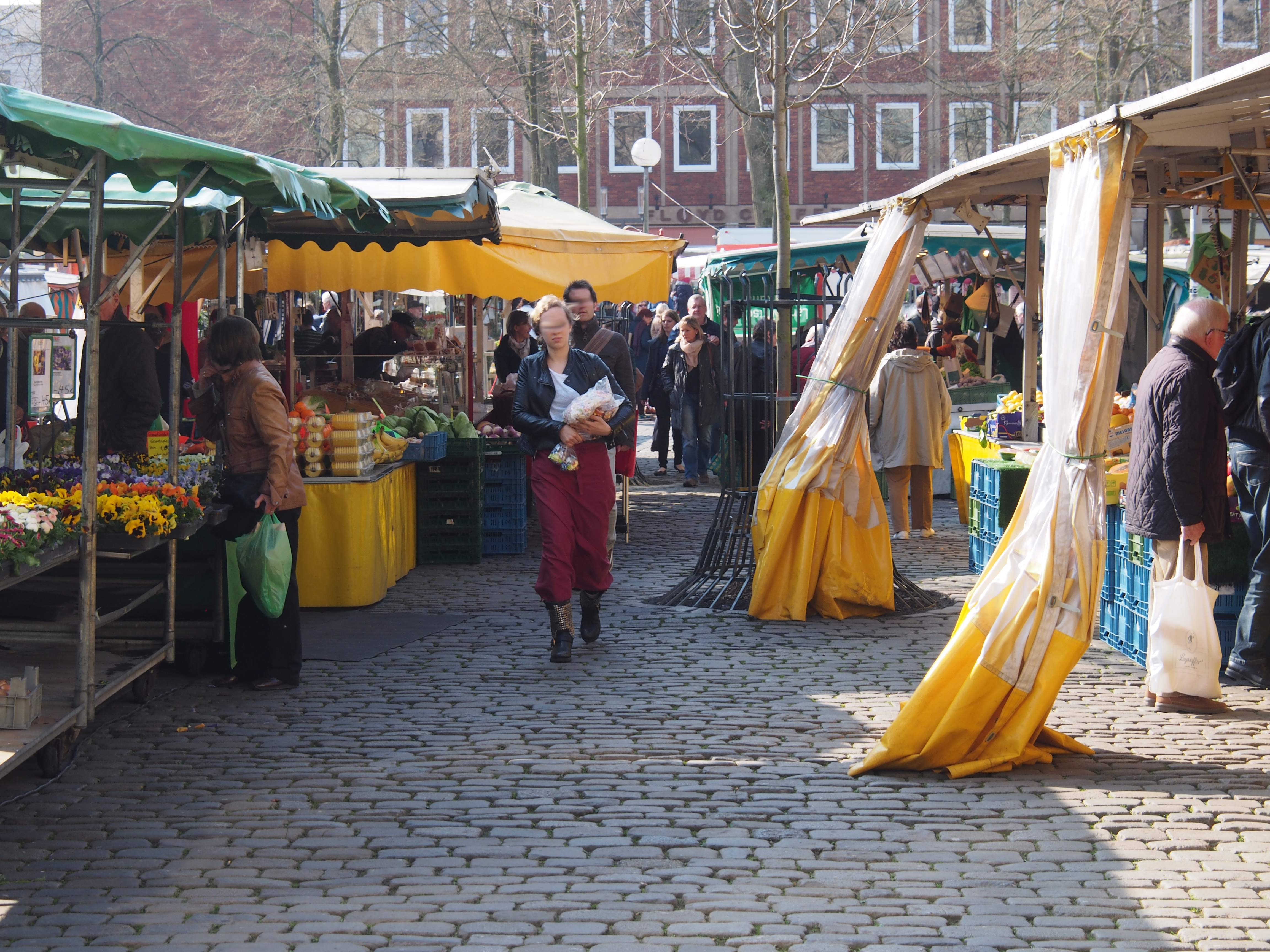 Stände auf dem Wochenmarkt in Münster (Westfalen)